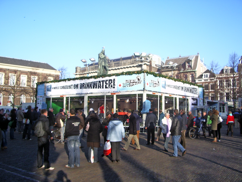 Het glazen huis van de 3FM-serious request actie op het Plein in Den Haag in december 2007